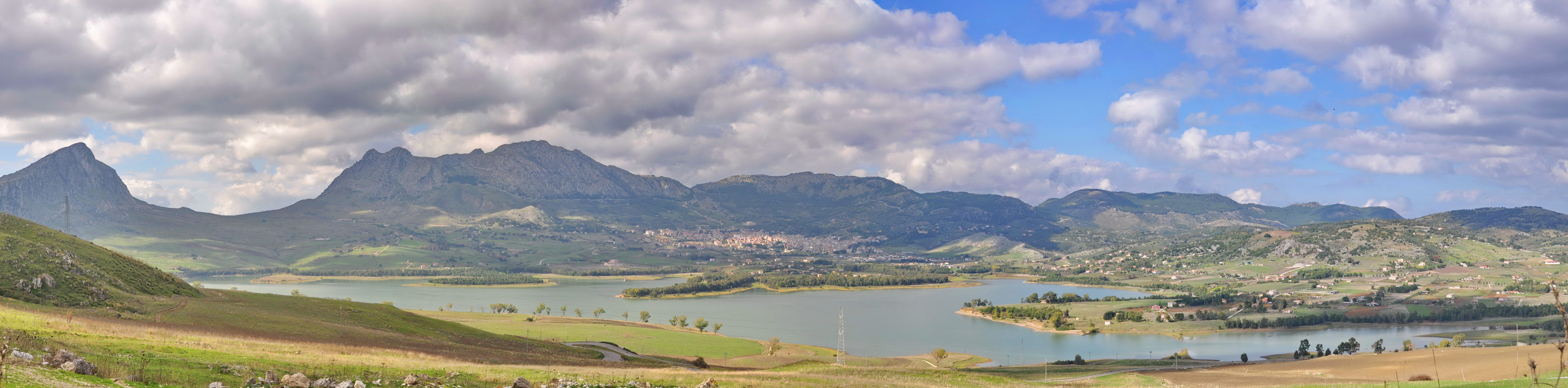 Panoramica su Piana degli Albanesi